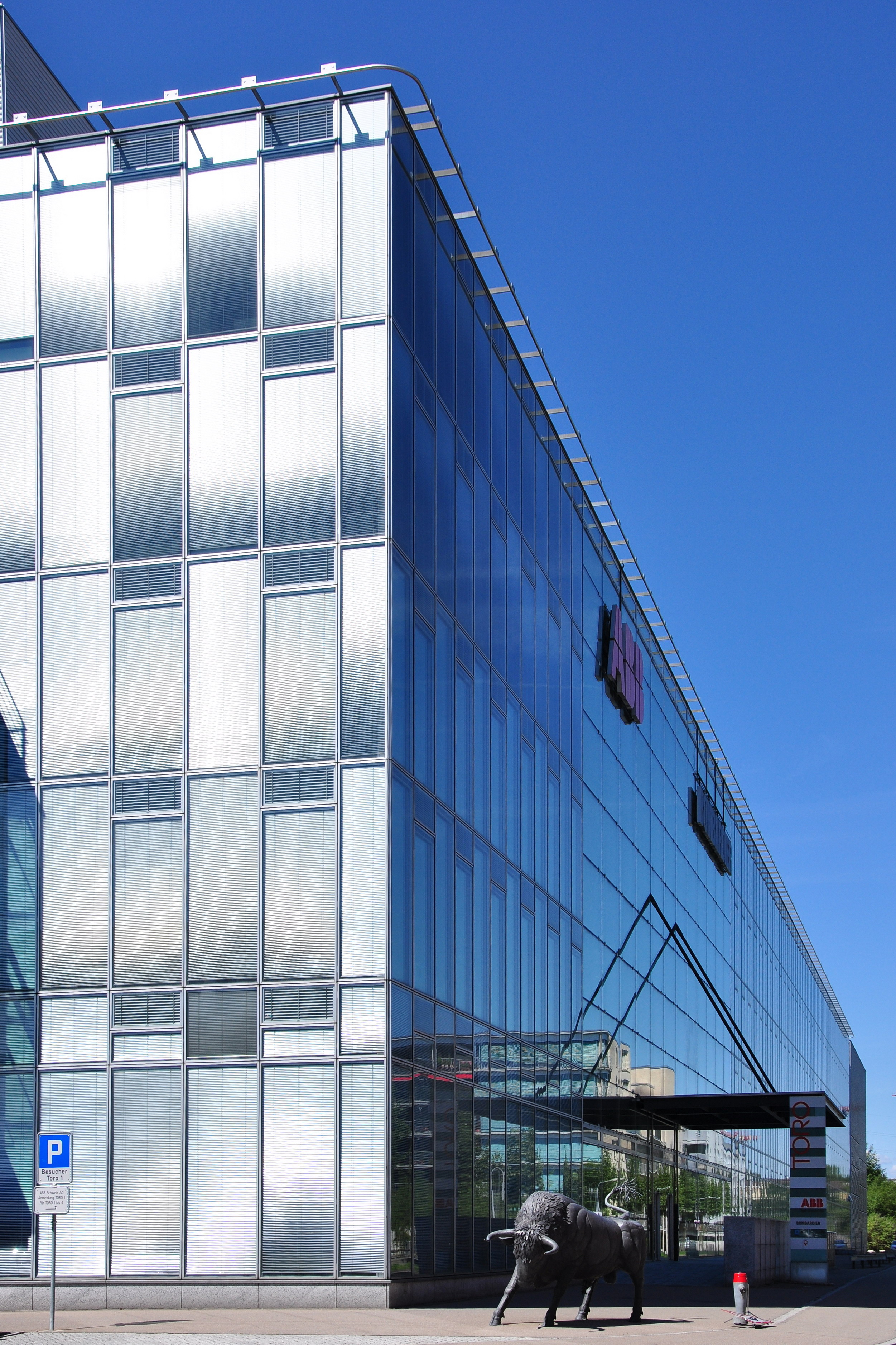 Zürich-Oerlikon (Zürich-Nord, Switzerland)